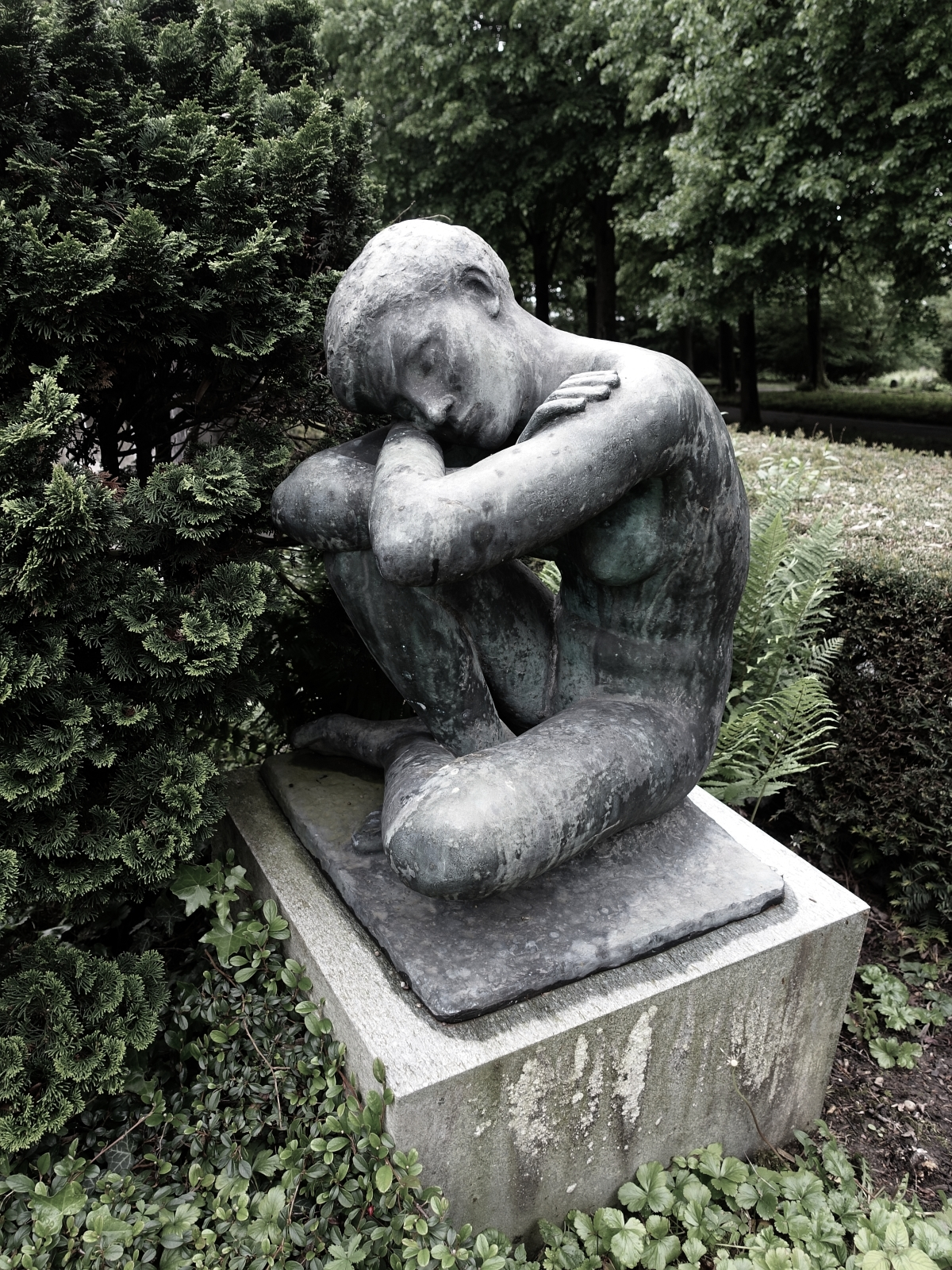 Grabskulptur von Max Pfänder (1900–1969) Bildhauer, Zeichner. Auf dem Friedhof am Hörnli